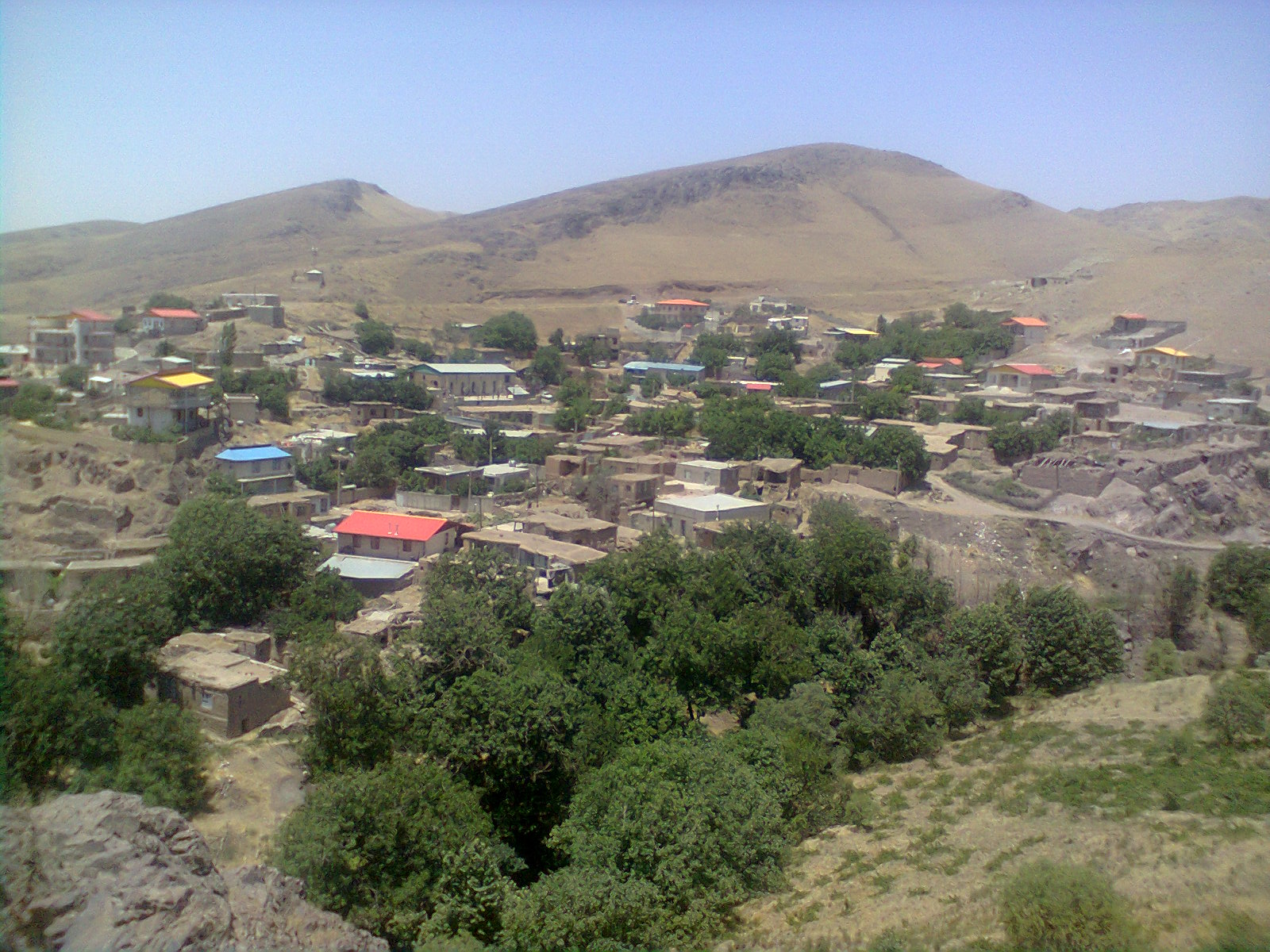 نمایی از روستای آتانک